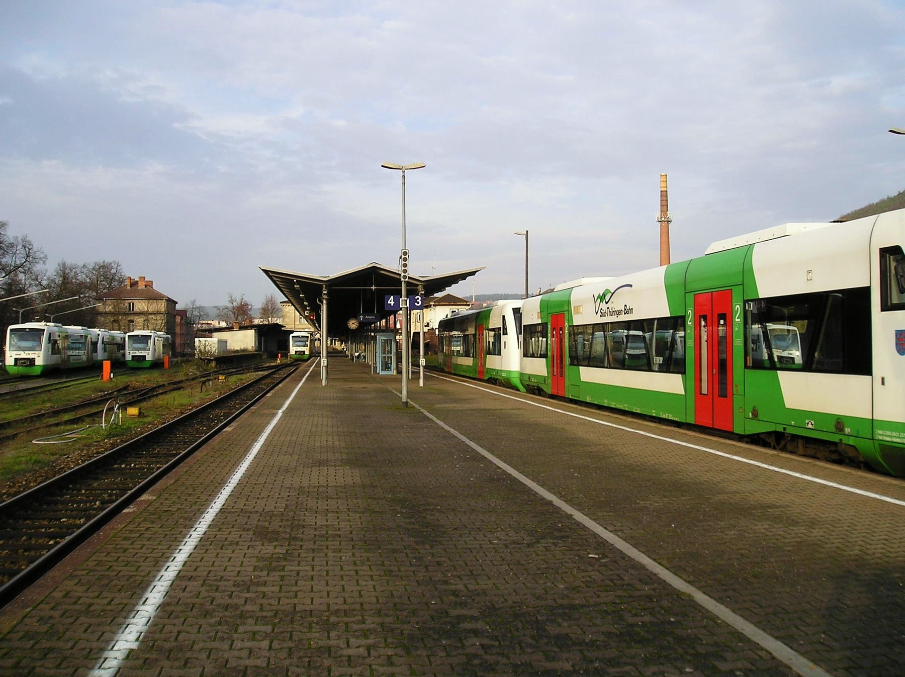 Der bayerische Bahnhof mit geparkten UnterfrankenShuttles (links, Bahnlinie Schweinfurt-Meiningen) und Triebwagen der Süd-Thüringen-Bahn in Meiningen.